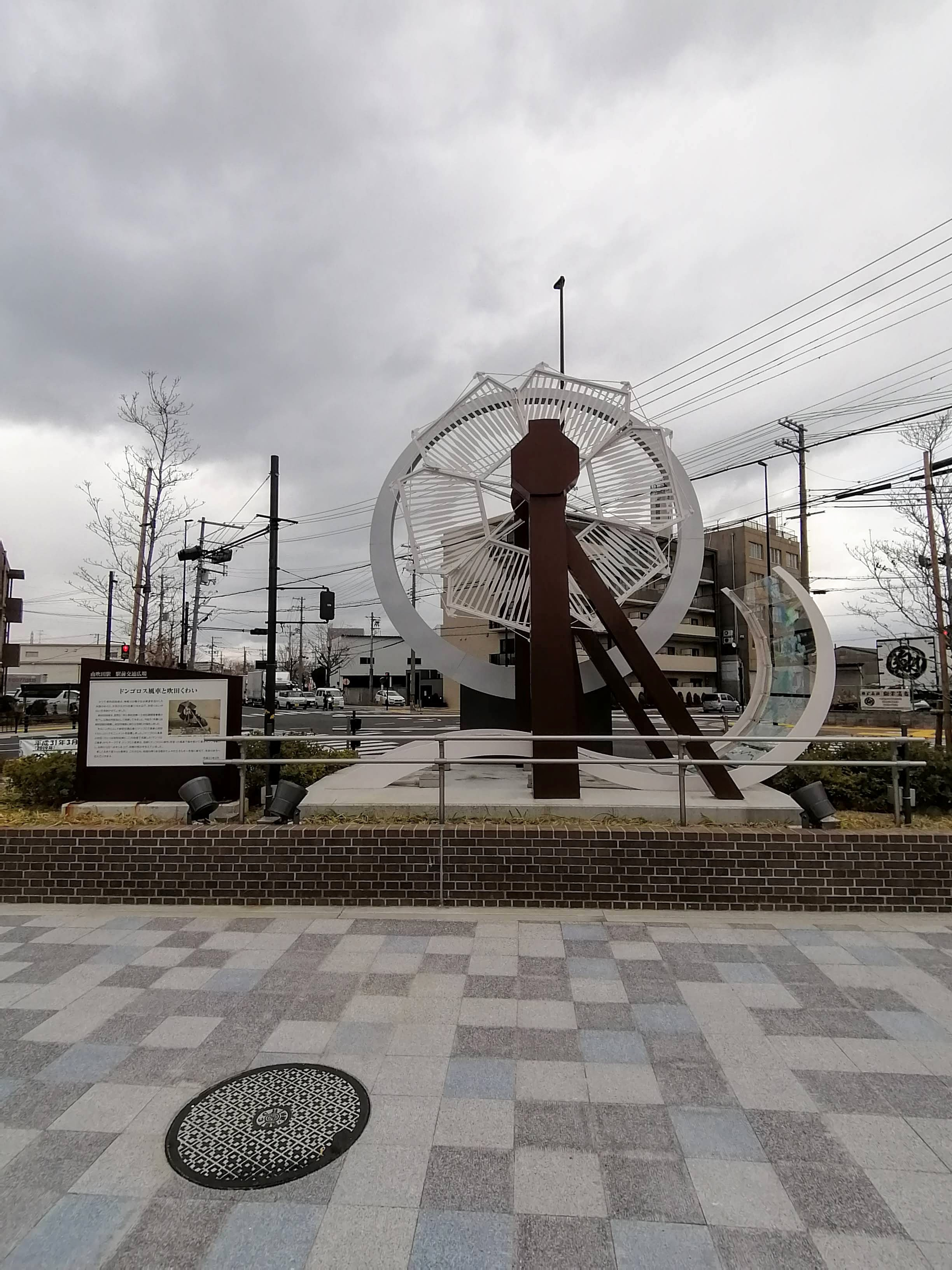 駅前広場にて撮影